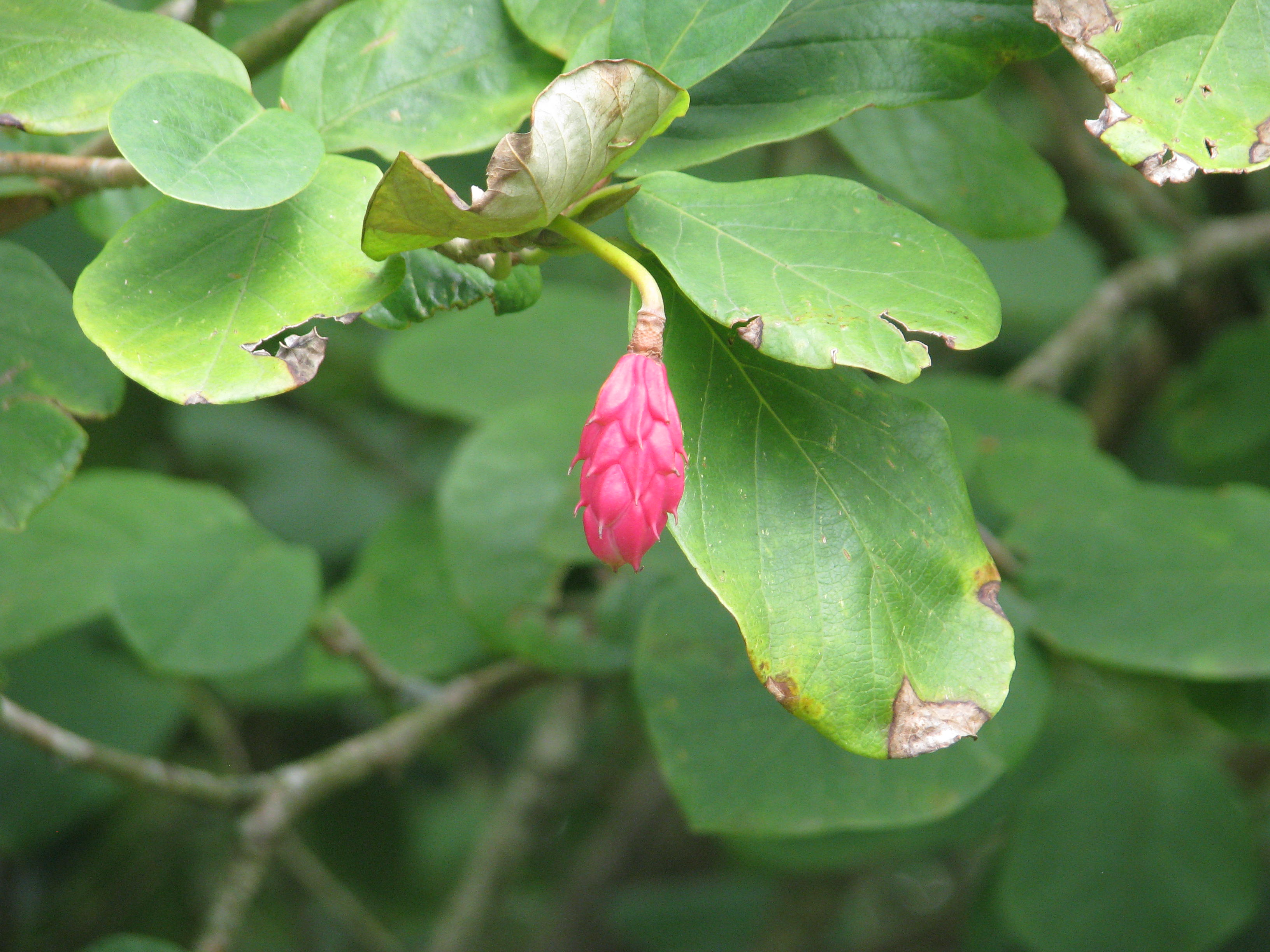 Magnolia sieboldii